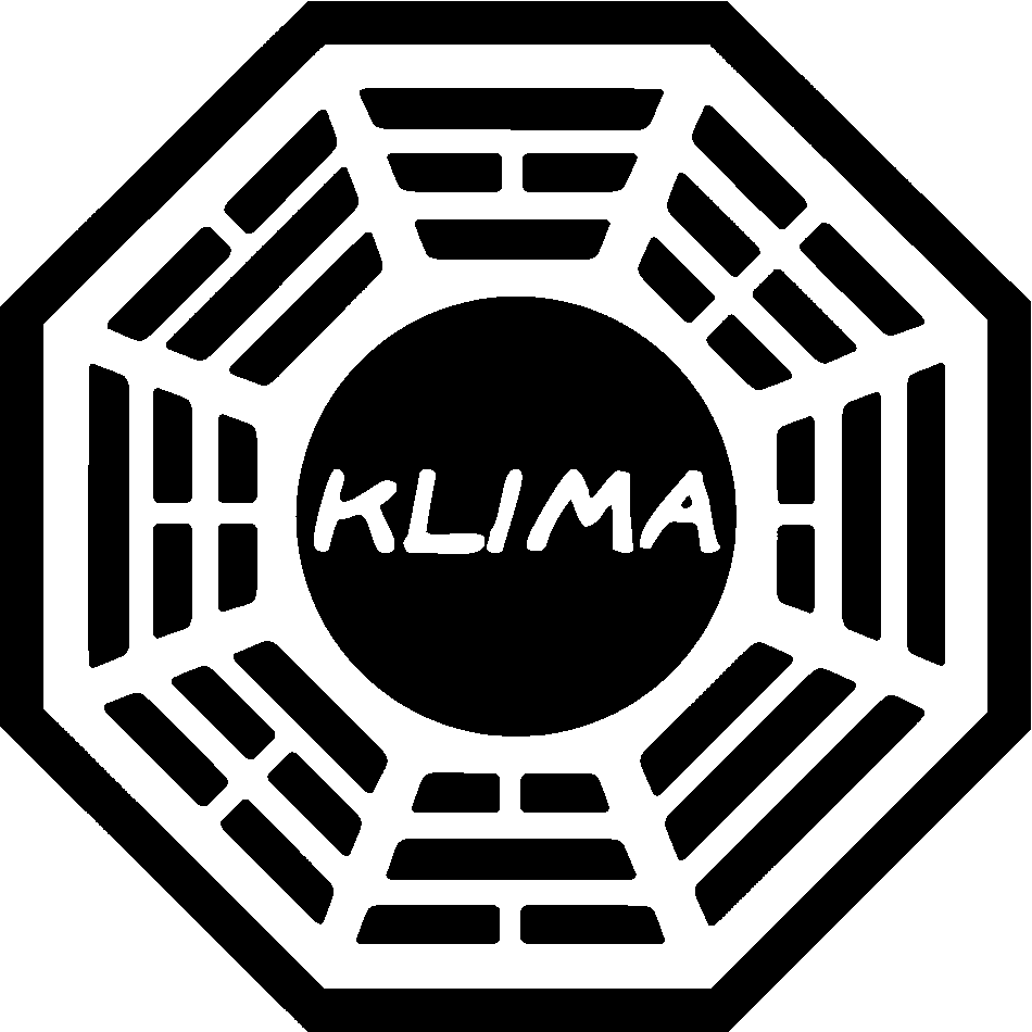 KLIMA